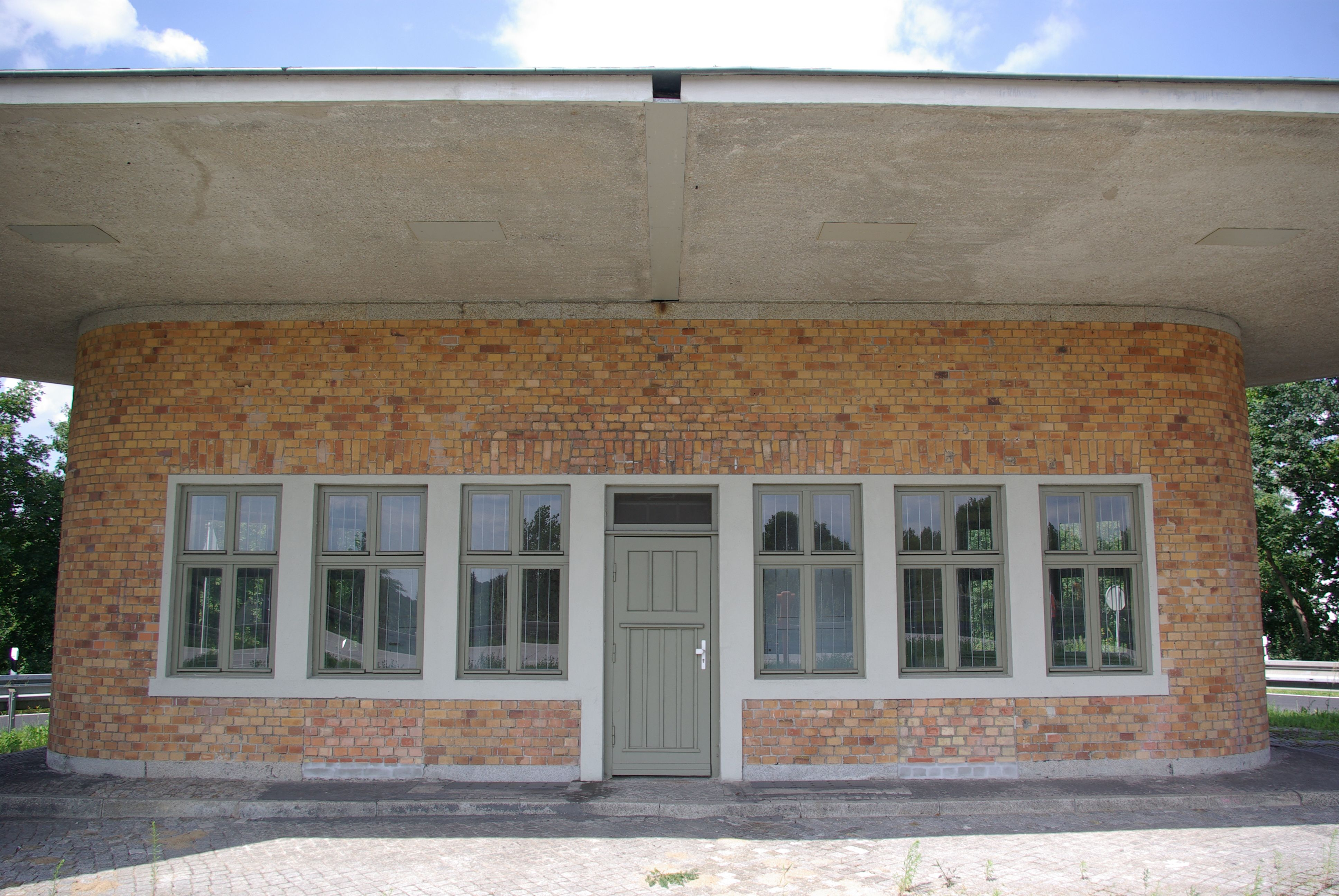 Die Autobahn A12 in Brandenburg im Bereich fürstenwalde/Spree. Die alte Tankstelle an der nördlichen Ausfahrt steht unter Denkmalschutz. Das Bild zeigt das Gebäude.